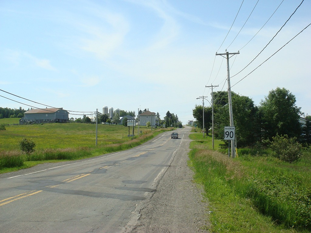 Photo de la route 293, à Saint-Jean-de-Dieu, Québec, Canada.